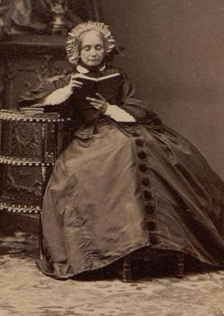 София Густавовна Мейендорф, ур. Штакельберг (1806—1891)